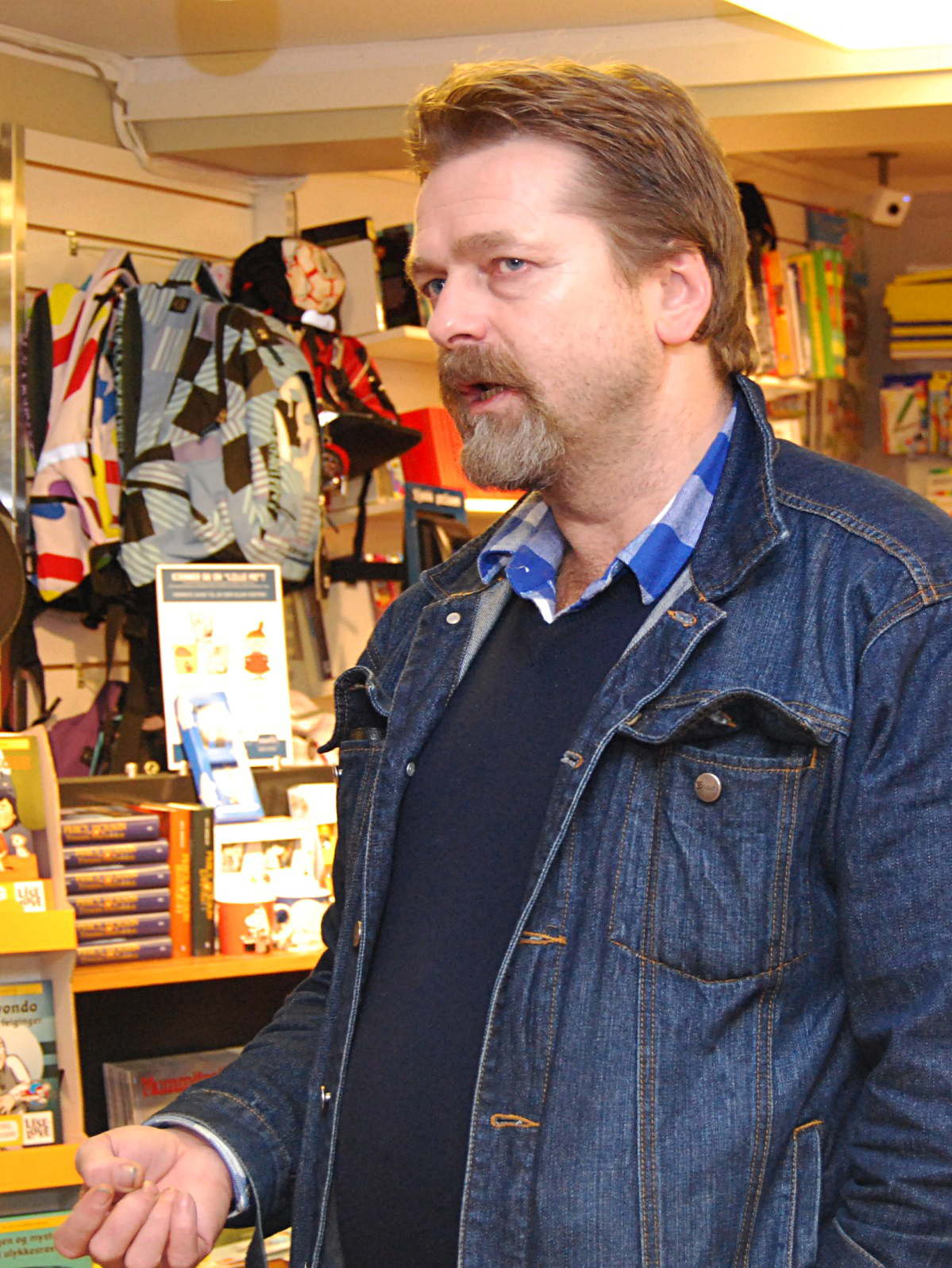 Forfatteren og lyrikeren Håvard Rem fotografert under en tilstelning på Norli bokhandel i Grimstad i forbindelse med "Læringsdagene 2010" i Aust-Agder.